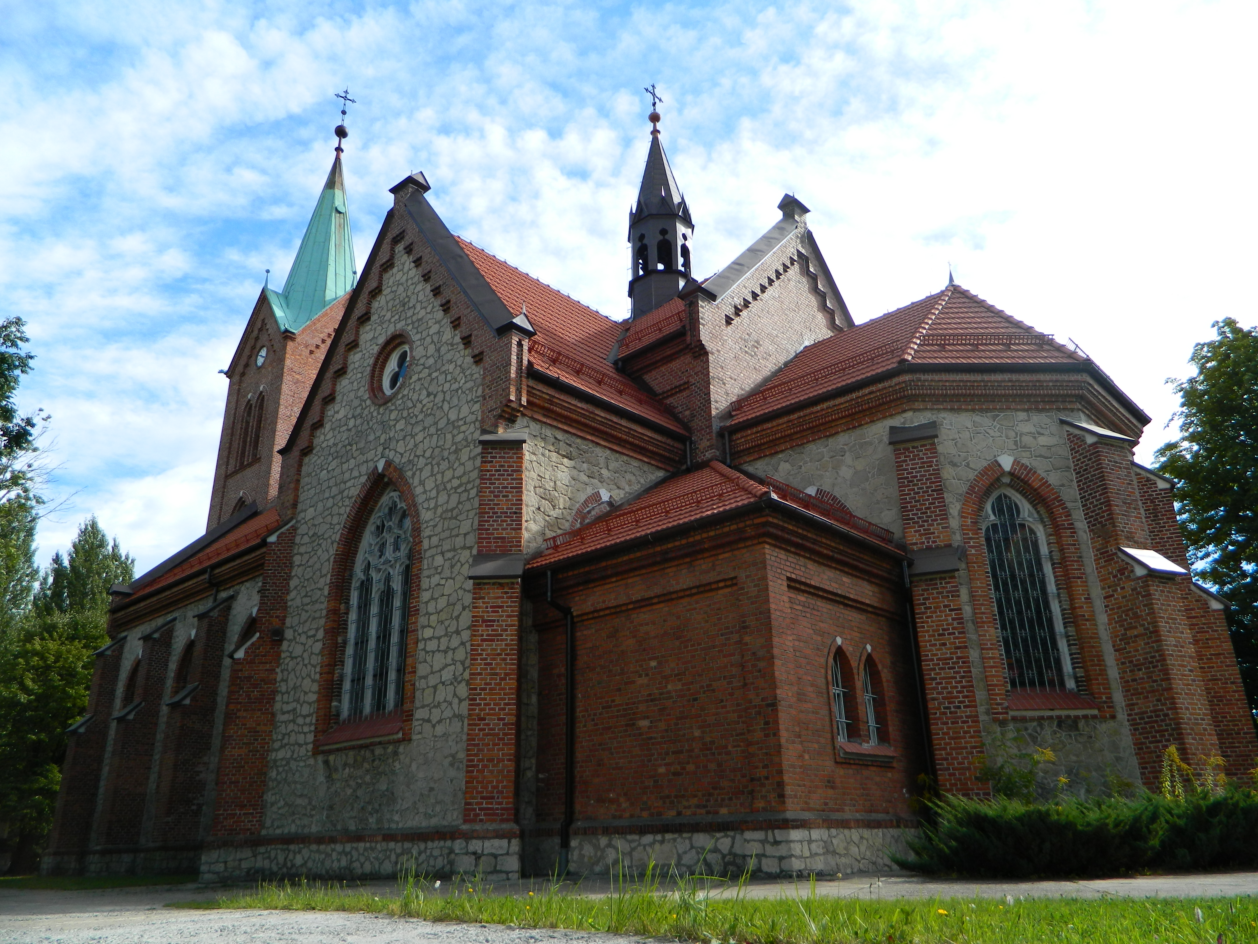 Jaworzno-Szczakowa